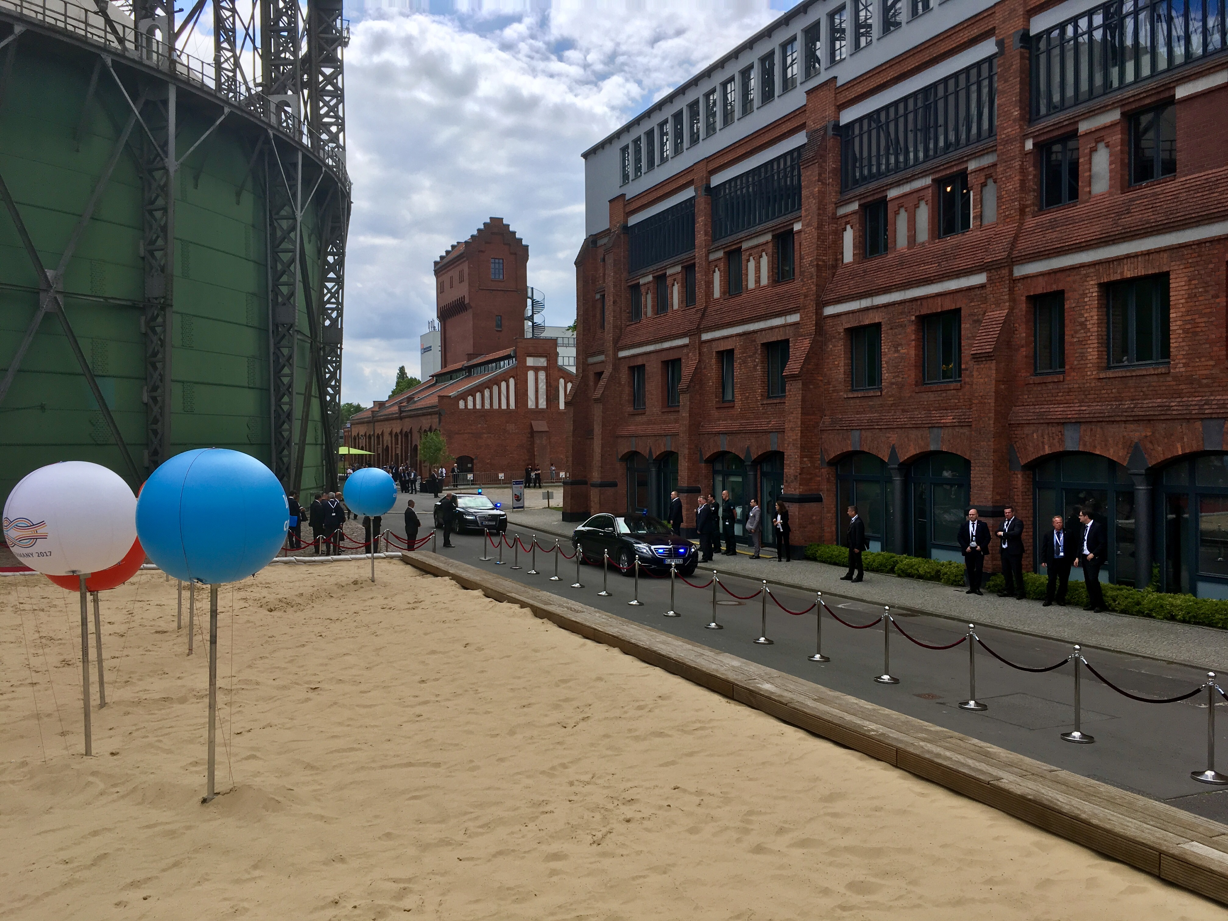 G20-Afrika-Gipfel im Juni 2017